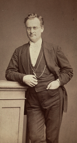 portrett, mann, skuespiller, stående knefigur.